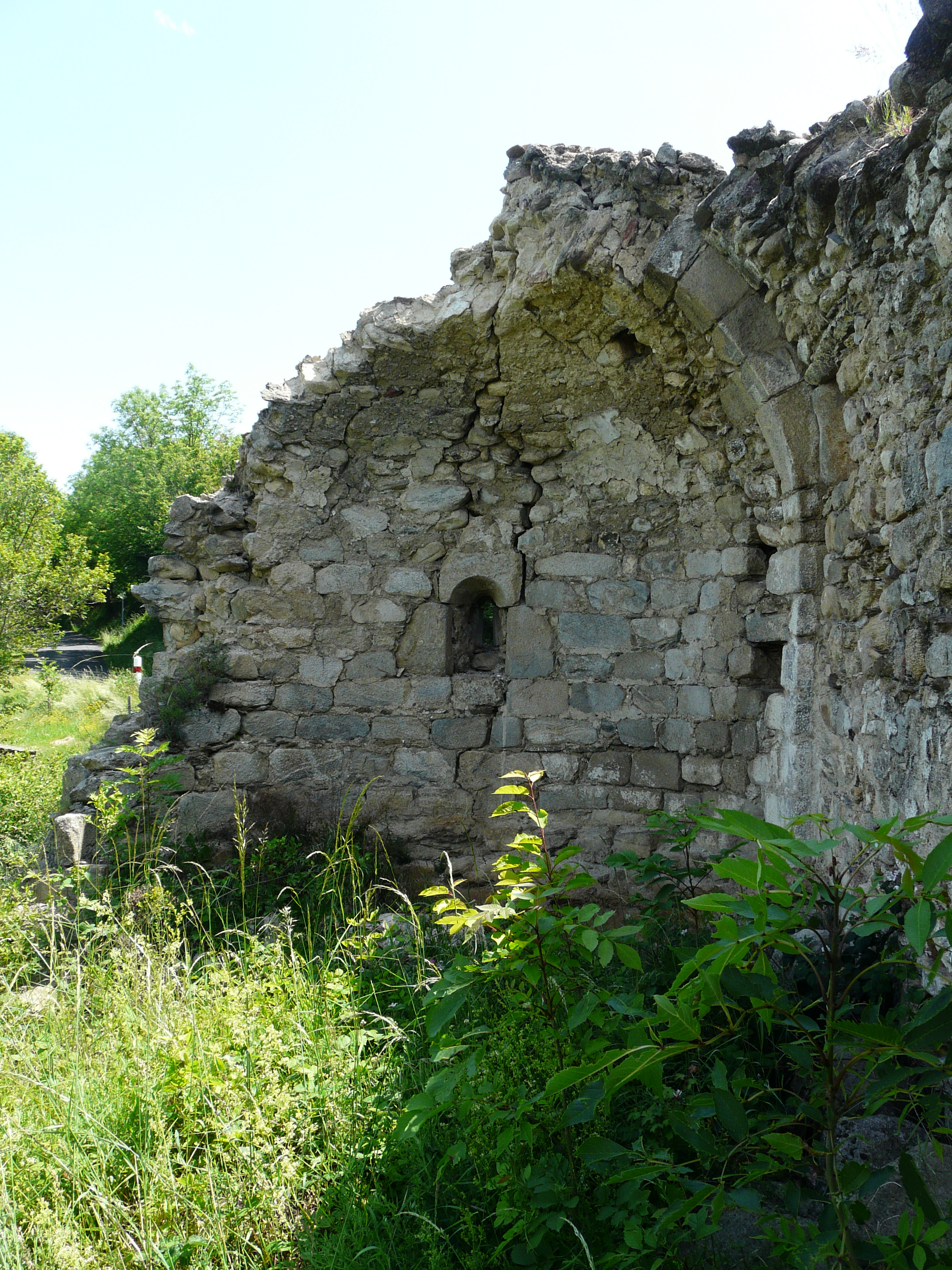 Interior de l'absis de Sant Pere de Fillols